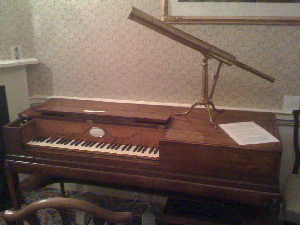 Herschel's organ